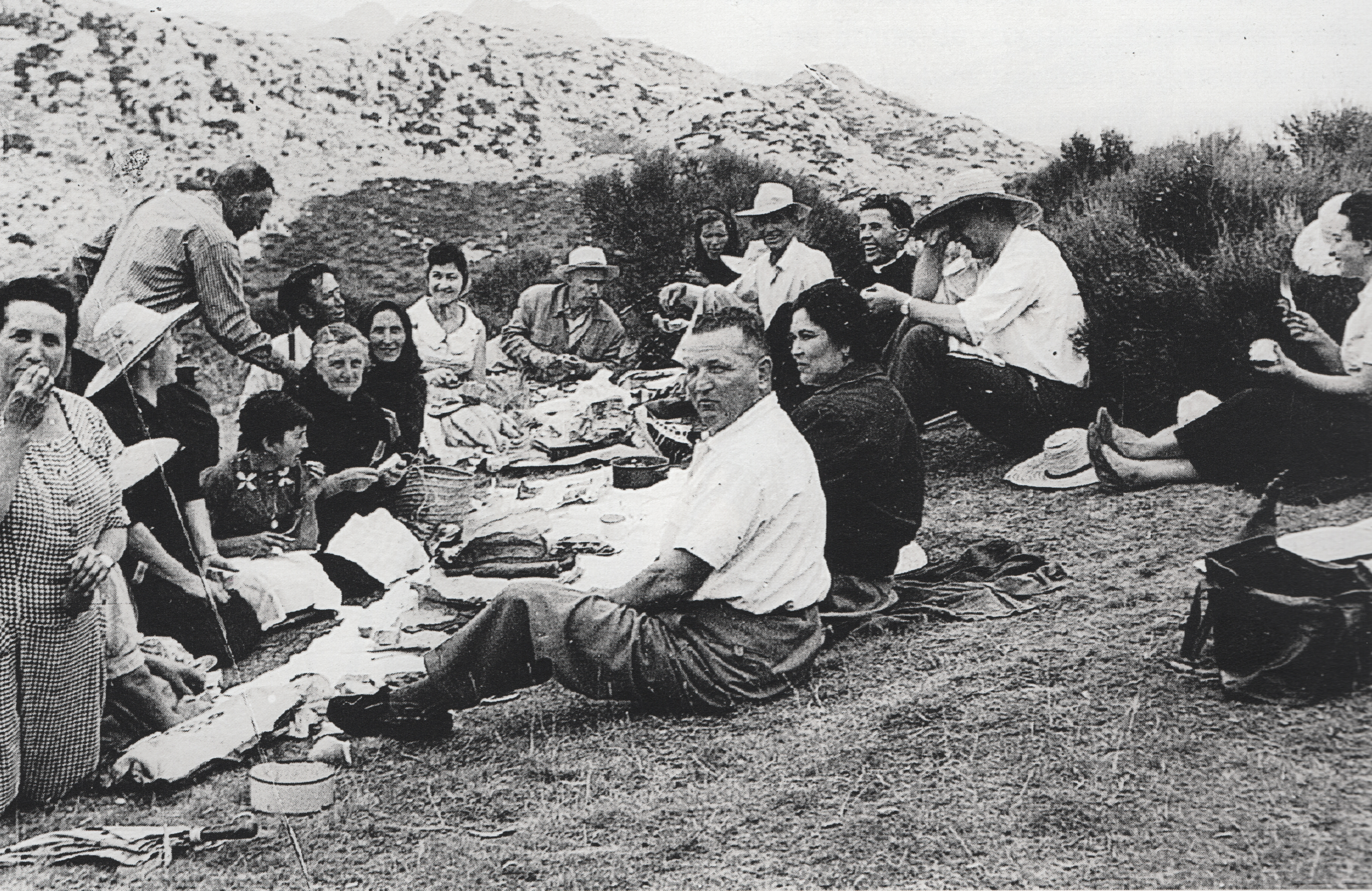 Borrega en Uvierzo en 1945